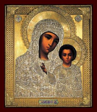 Our Lady of Kazan . ru: Икона. ru: Богородица Казанская